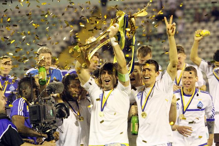 Динамо Київ володар Кубку України 2014 року